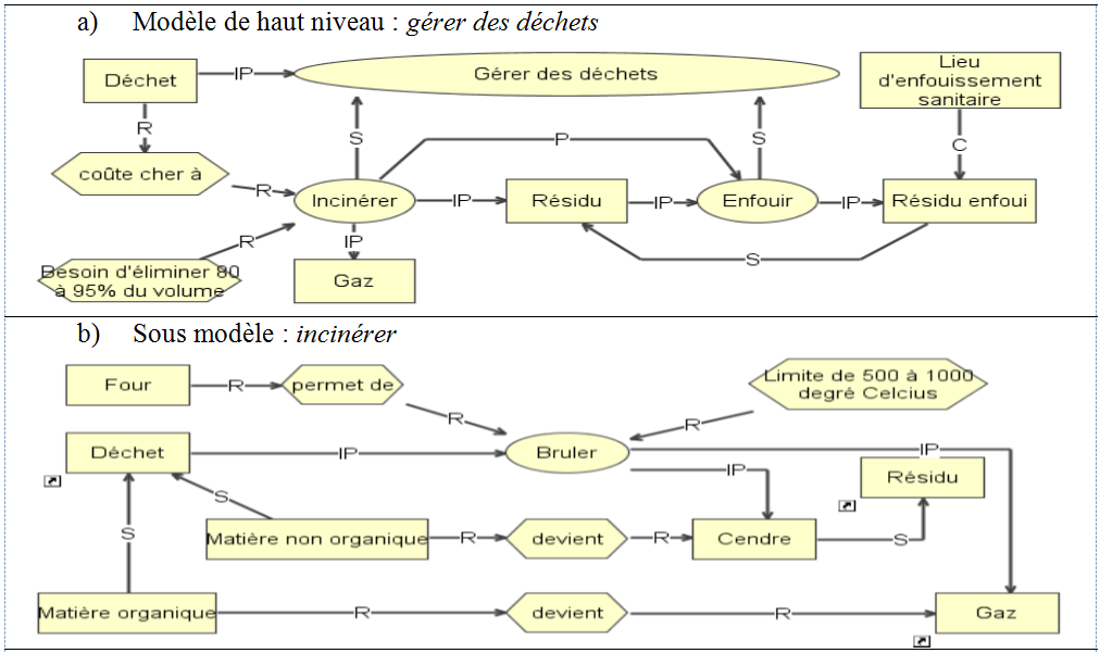 Exemple de validation avec OntoCASE